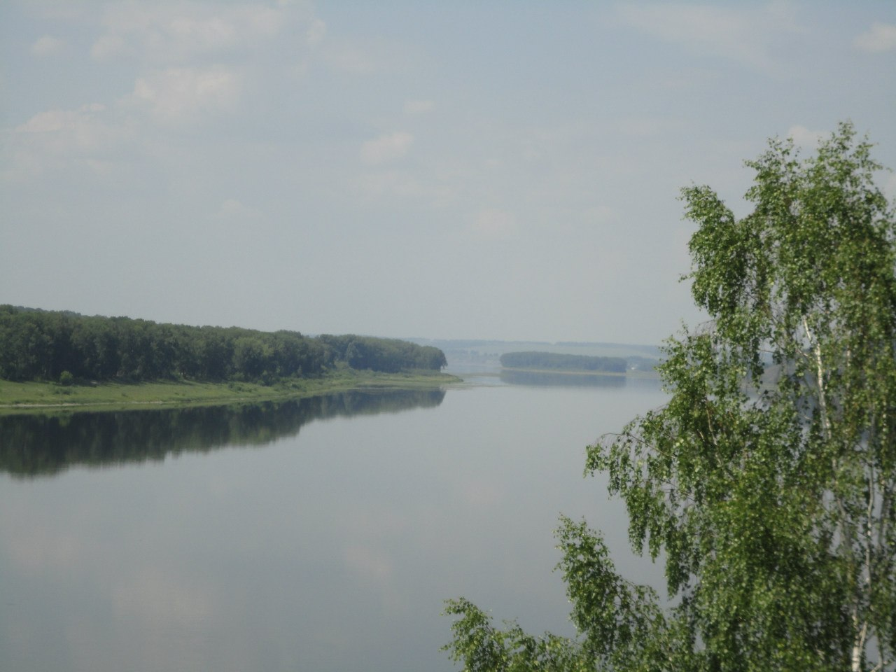 Нижне-Томский заказник, Юргинский район This image is related to the protected area of Russia number 4210029